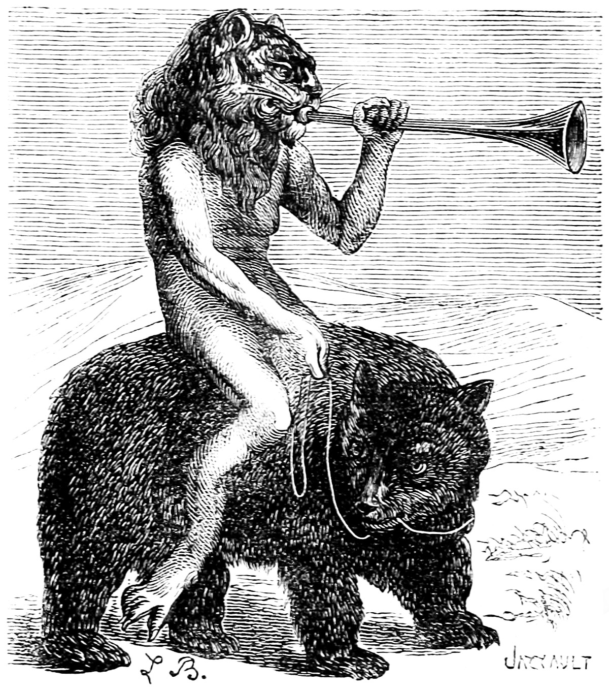 Pruflas. Illustration du Dictionnaire infernal de Jacques Auguste Simon Collin de Plancy par Louis Le Breton, 6eme édition, 1863. Note: The Goetia does not include Pruflas as a demon. However, the picture of Purson in Mather’s Goetia corresponds with Pruflas in the Dictionnaire Infernal. Both Purson and Pruflas are listed in Wier’s list, but only Pruflas is listed in de Plancy’s list